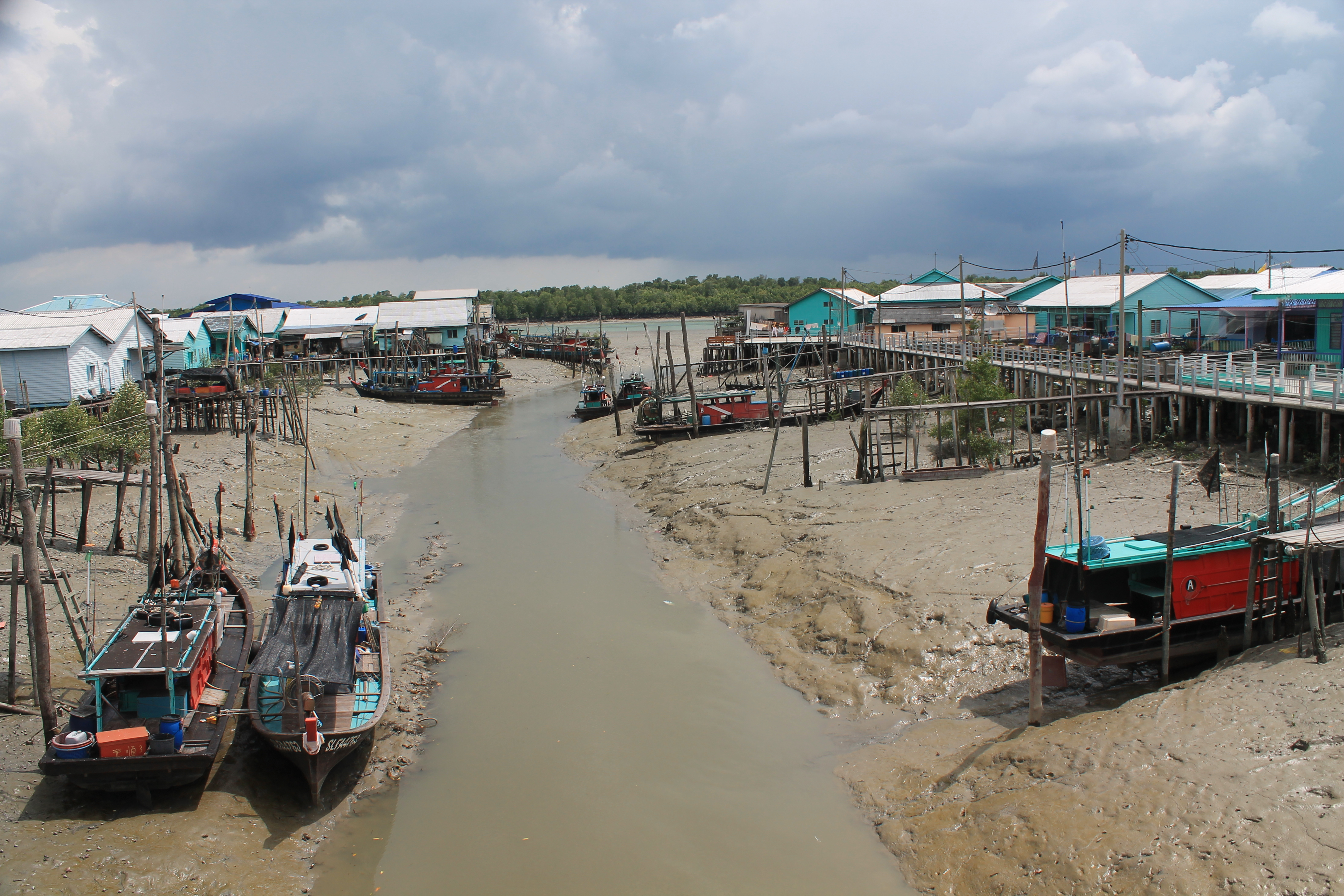 吉胆岛景观：渔港。